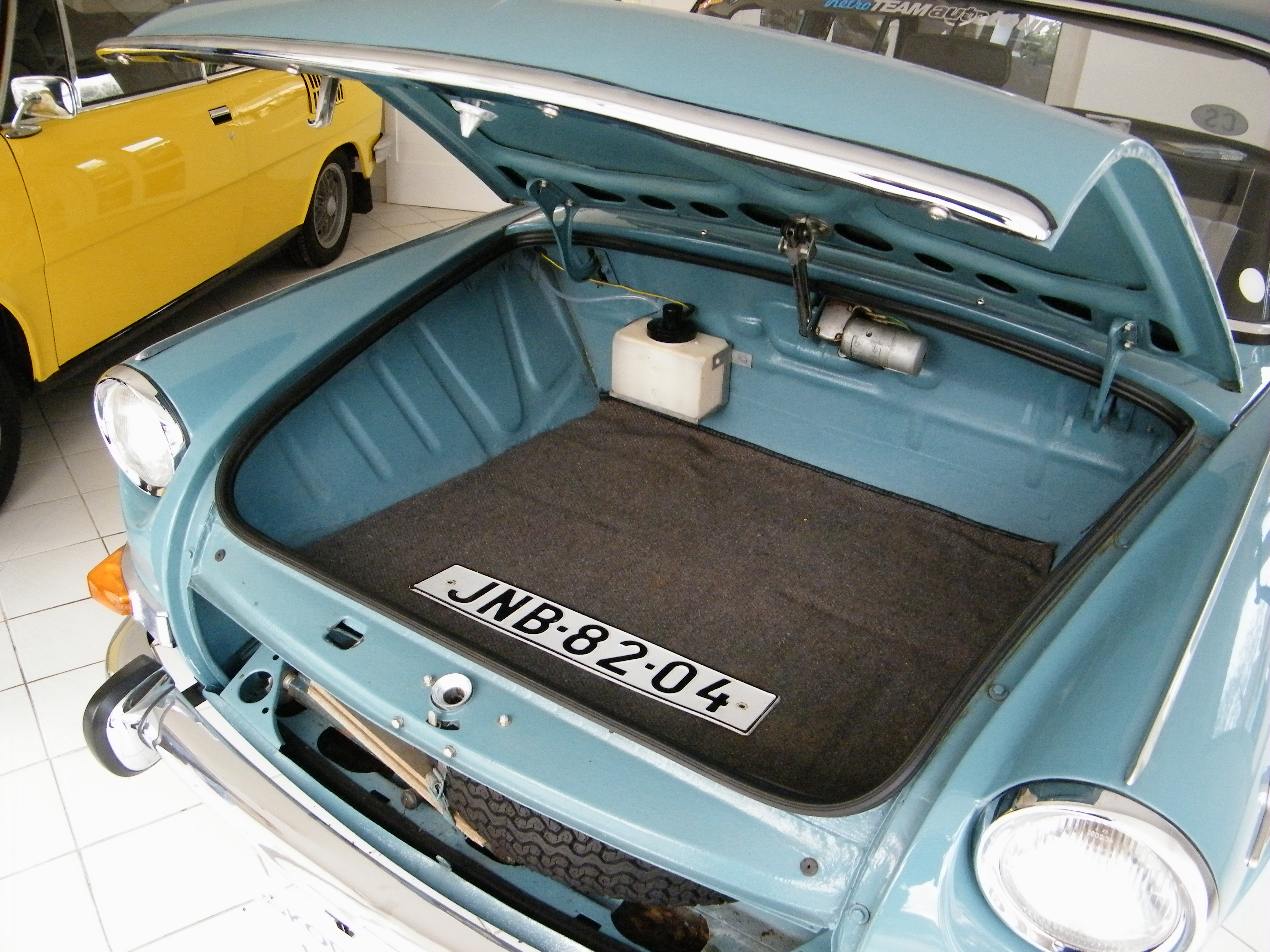 Škoda 1000 MB de Luxe